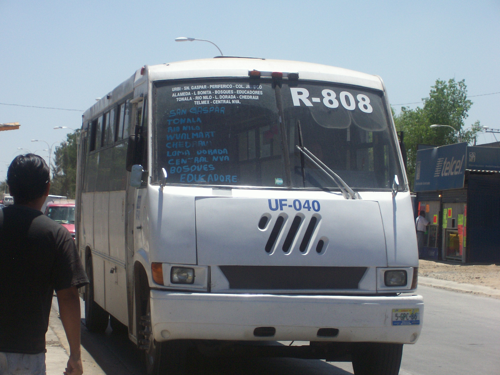 Transporte publico ilegal de Guadalajara, Federacion Democratica de Conductores Jalisco Ruta 808